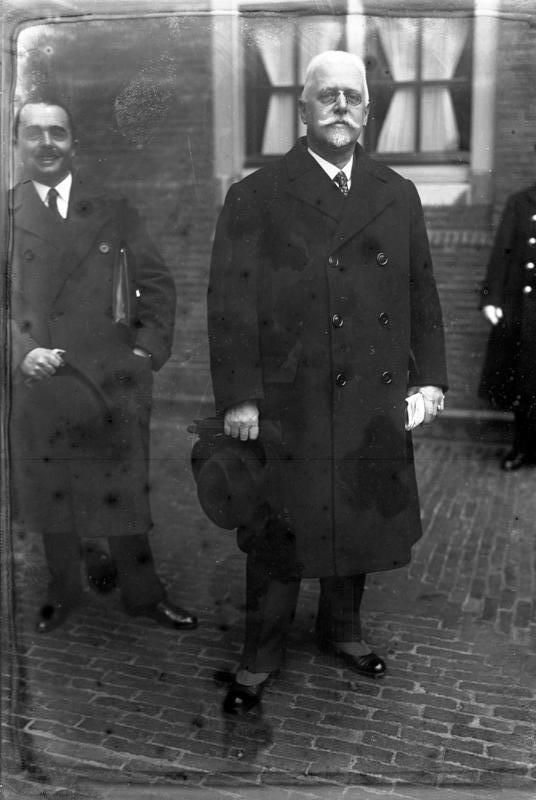 Der Oesterreichische Bundeskanzler a.D. Johannes Schober, ist im Alter von 57 Jahren gestorben ! Dr. h.c. Johannes Schober, wurde im Jahre 1918 Polizeipräsident von Wien, um später als Bundeskanzler und Aussenminister die Geschicke seines Landes zu vertreten.